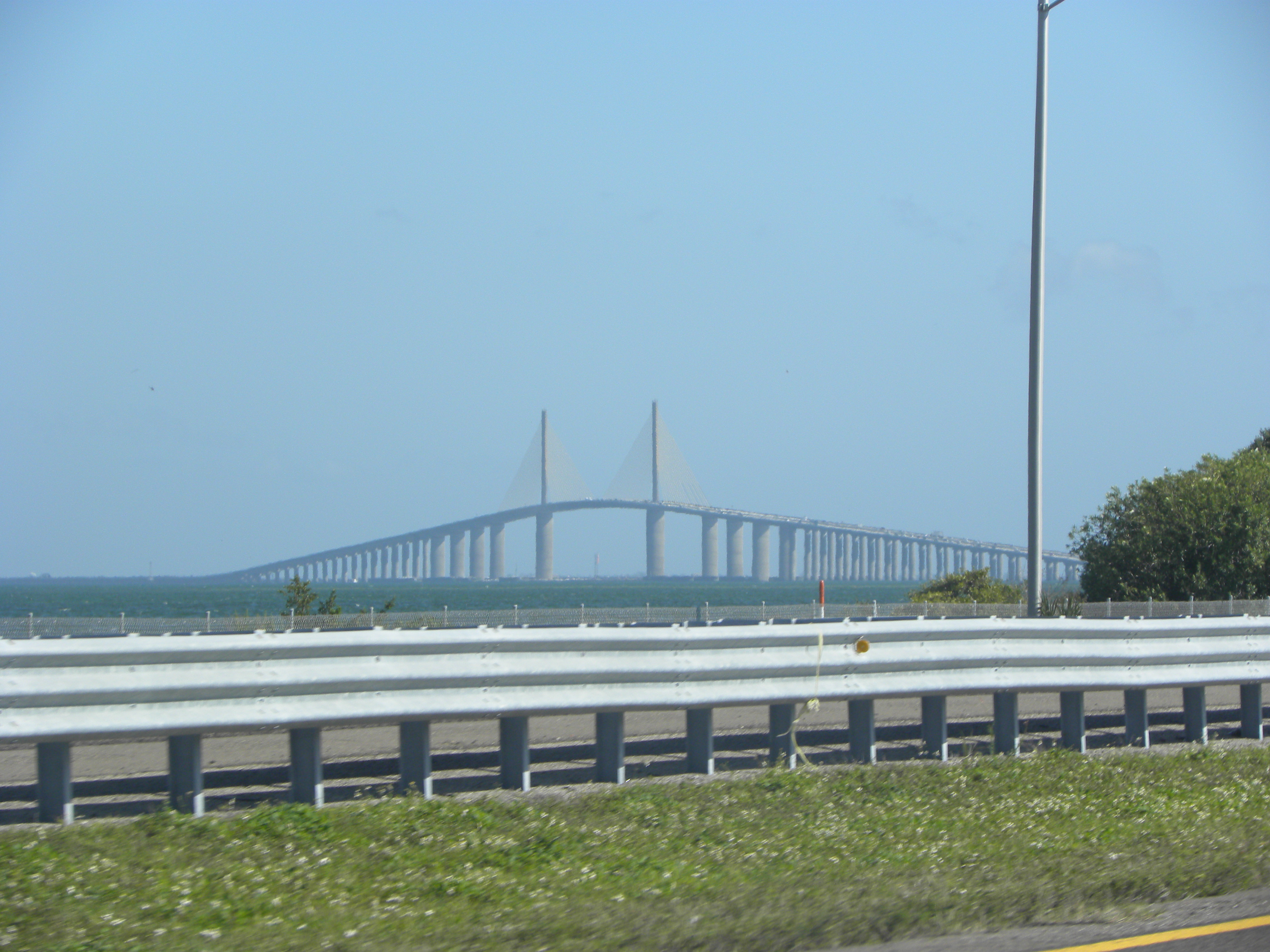 Puente de 8 millas de longitud que une la ciudad de Tampa y St. Petersbourg